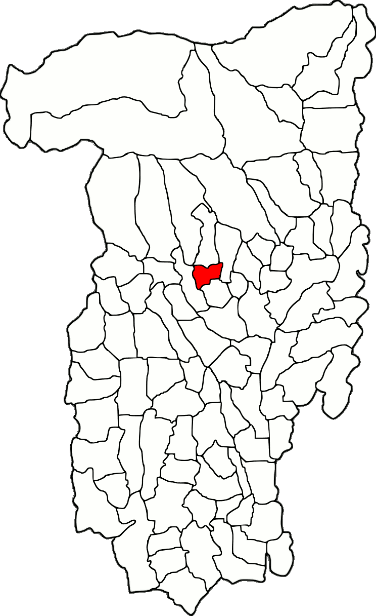 Lage der Gemeinde Pietrari im Kreis Vâlcea (RO).